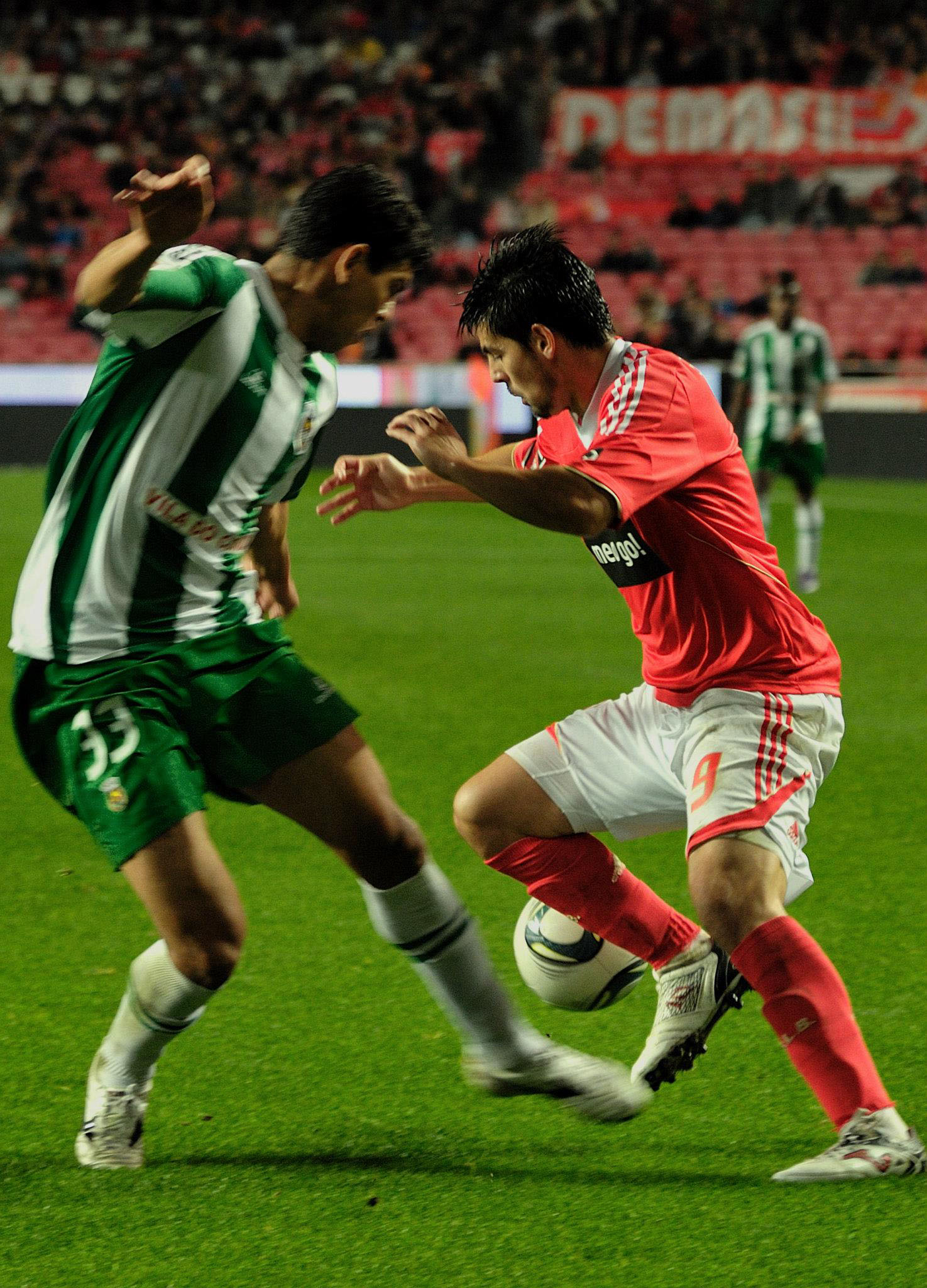 Nolito e Éder